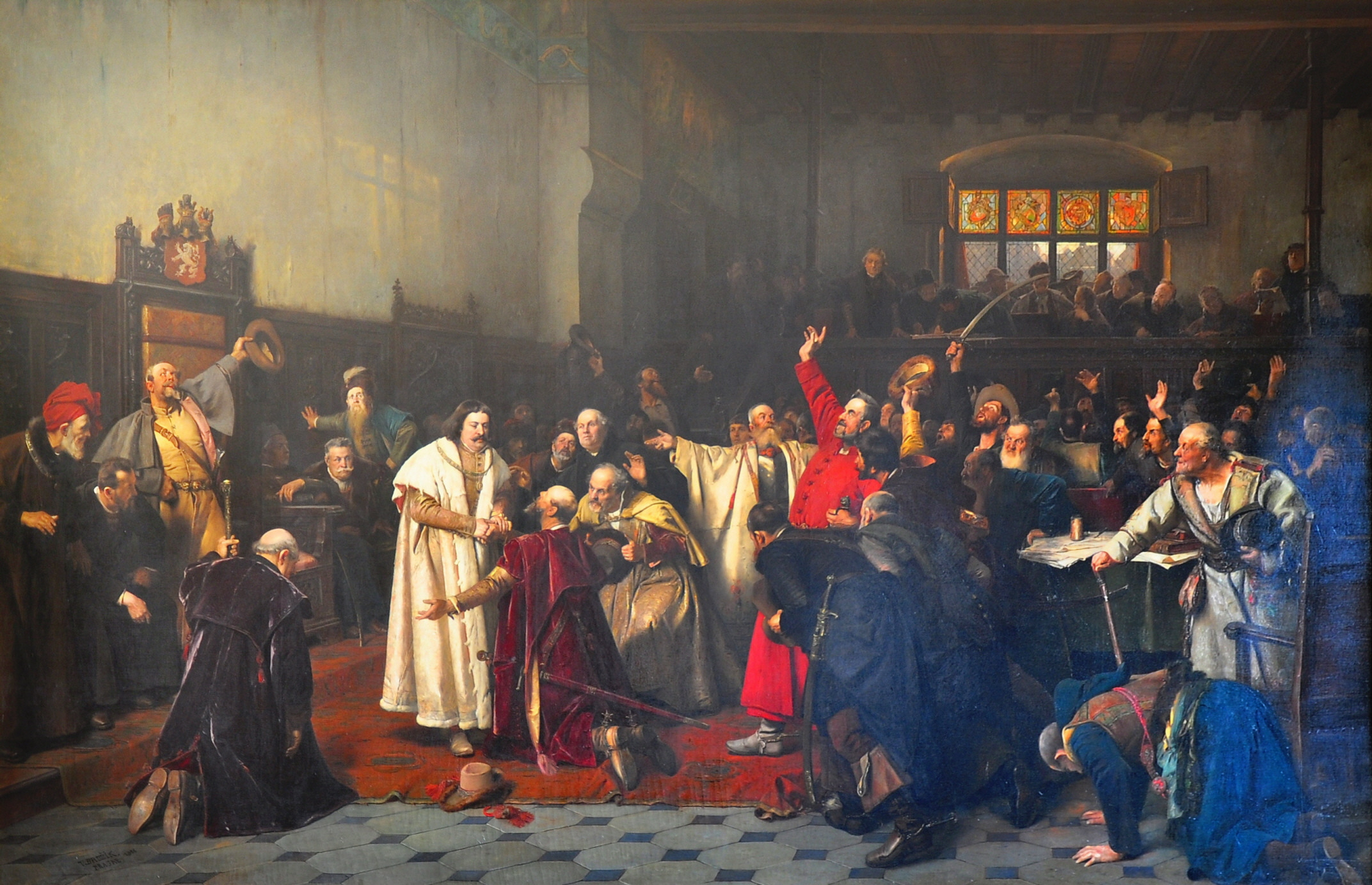 Výjev z volby českého krále, Jiřího z Poděbrad.